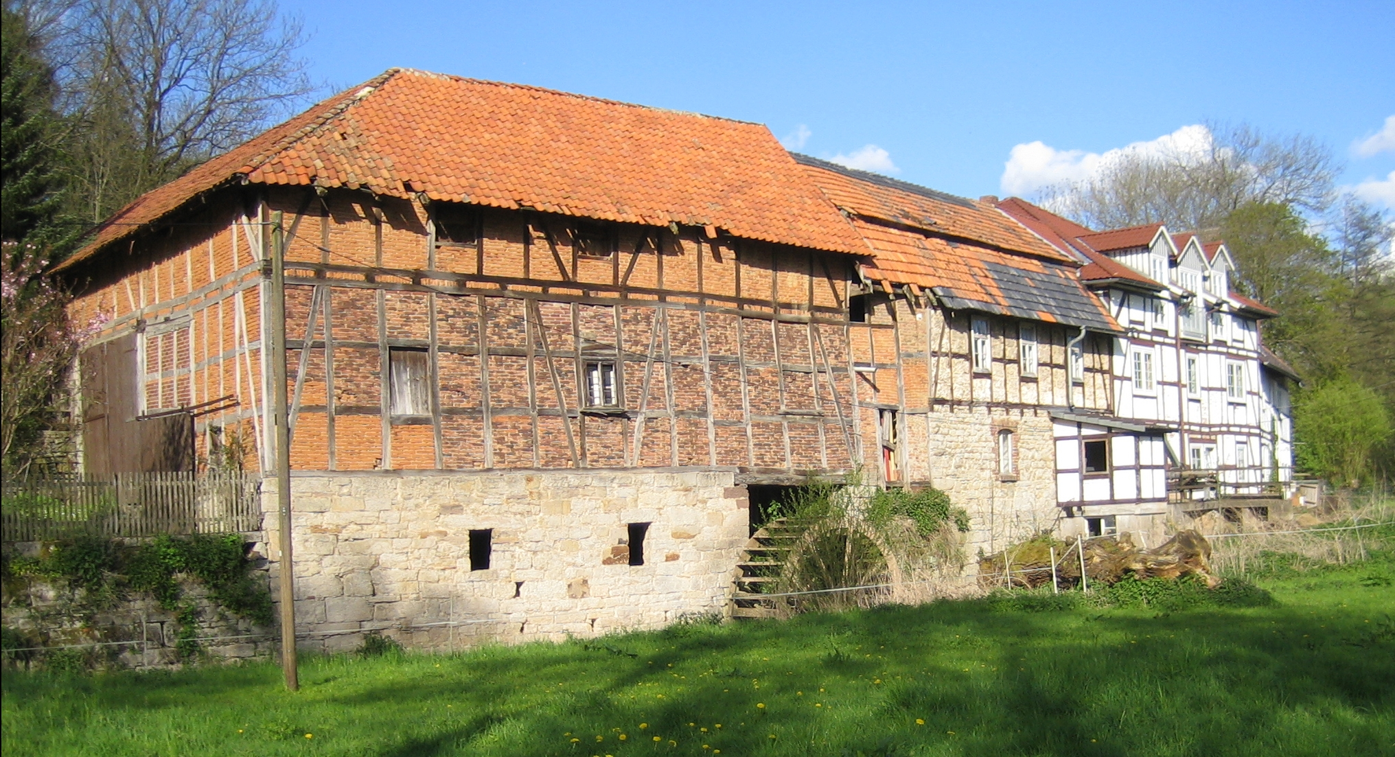 Fuchsmuehle in Niedermeiser